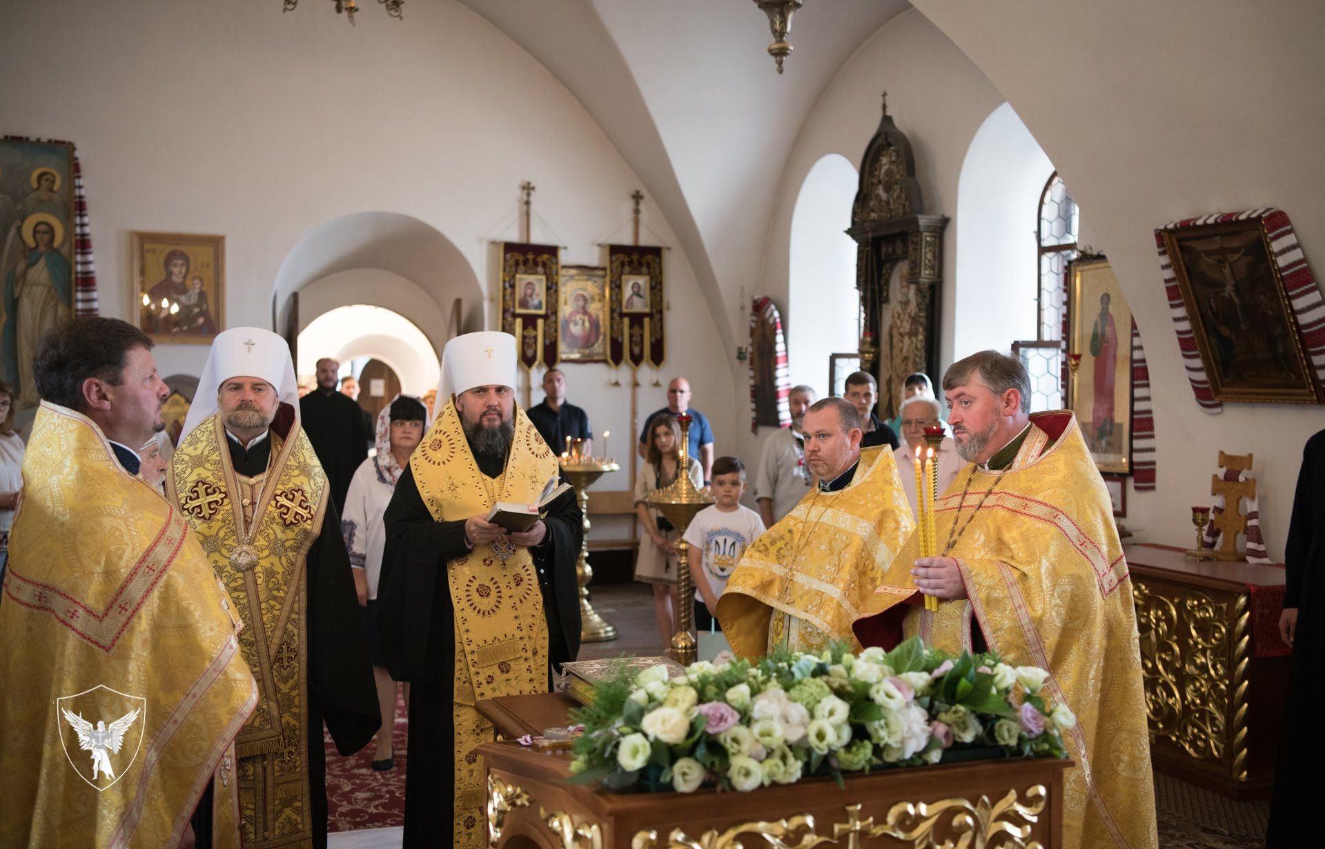 Молитва за капелана ПЦУ Івана Михайлишина і його сім'ю